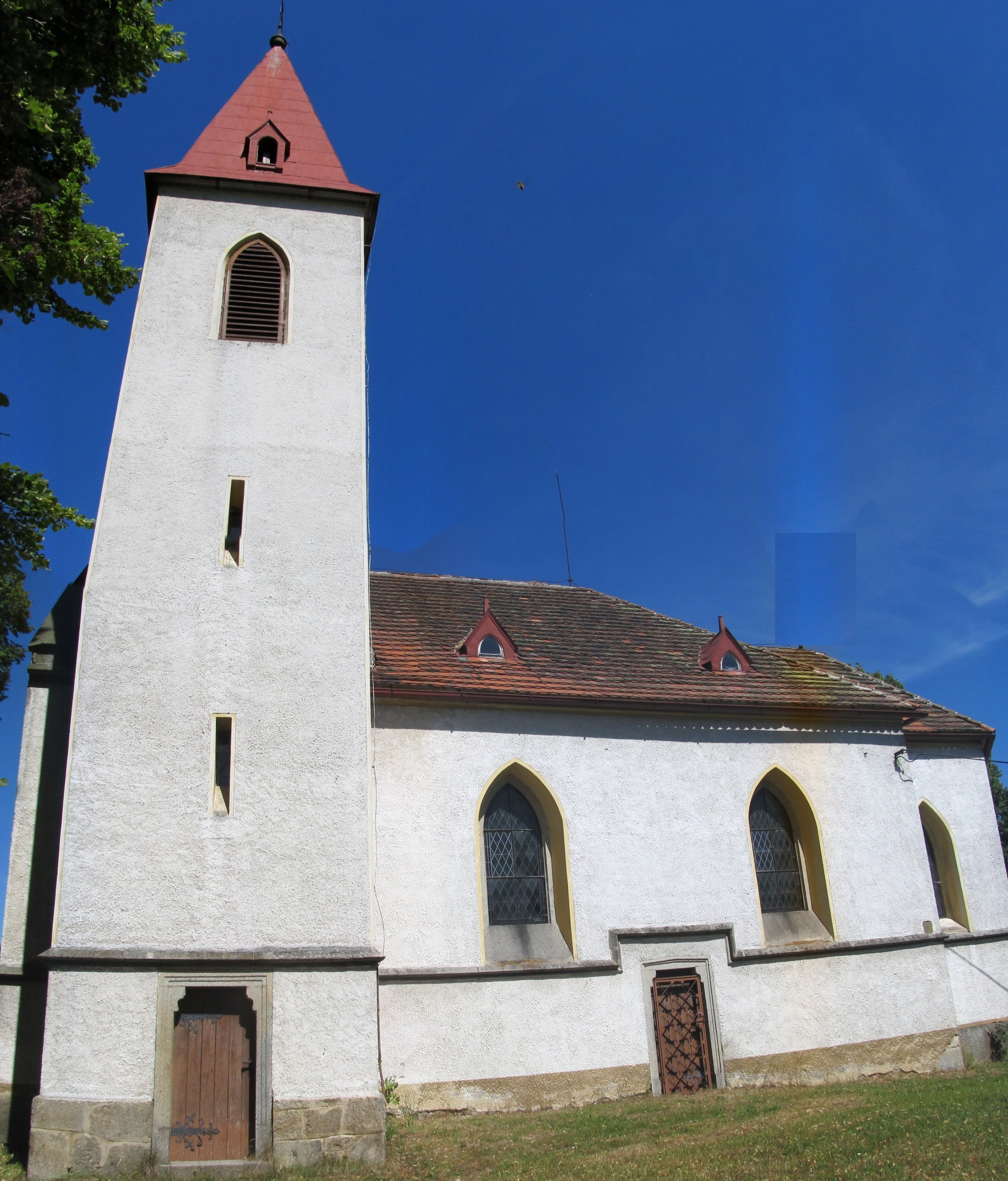 Chlistov - kostel Povýšení svatého Kříže